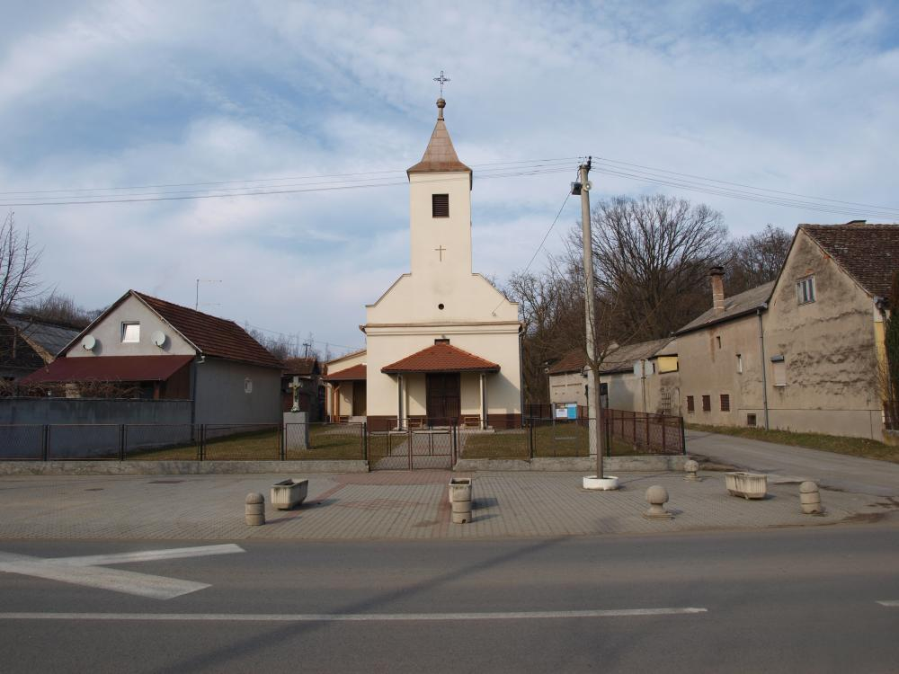 Crkva u Gromačniku, Brodsko-posavska županija.